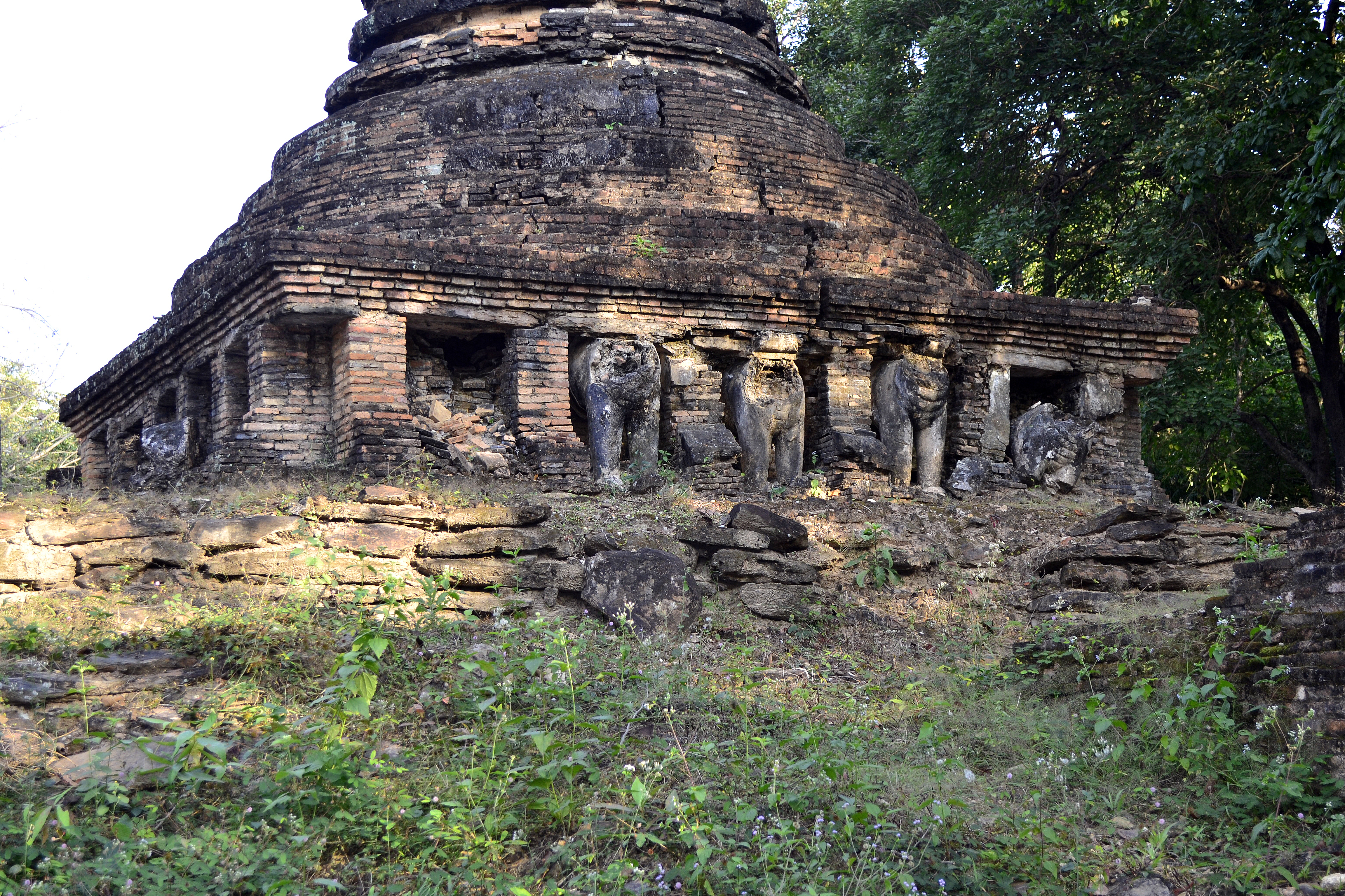 Wat Chang Rob im Geschichtspark Sukhothai